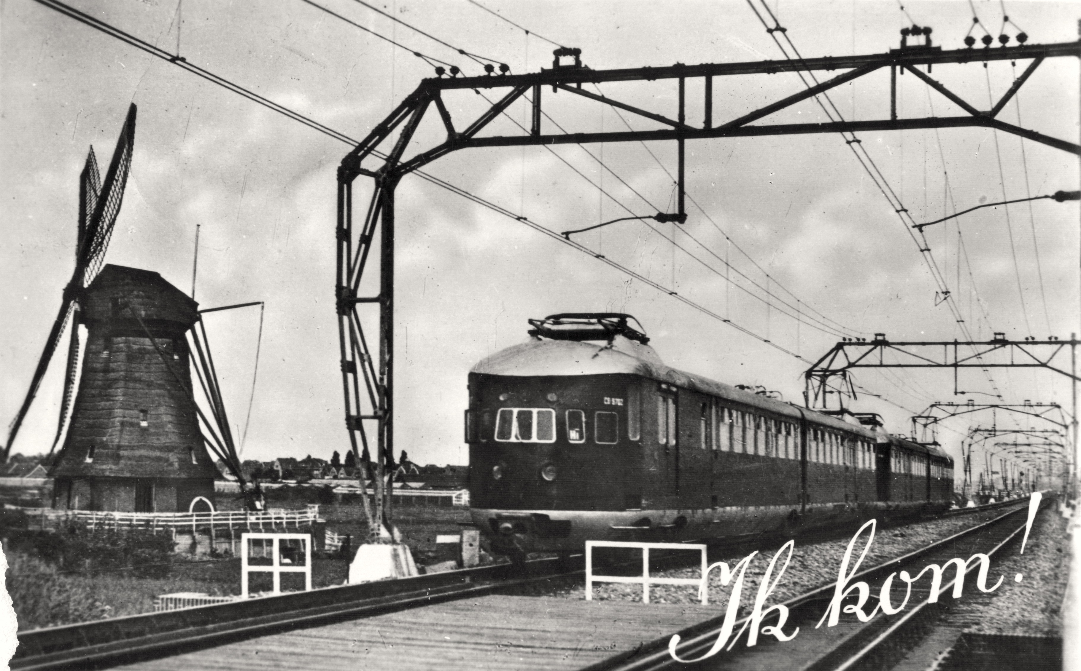 Twee gekoppelde elektrische treinstellen Materieel '35 ('Hoek van Hollanders') op de spoorlijn tussen Schiedam en Hoek van Holland; circa 1936. Collectie van het Utrechts Archief.